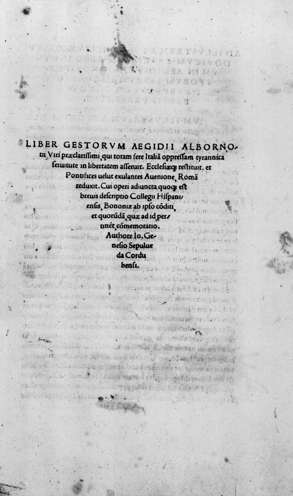 Frontespizio